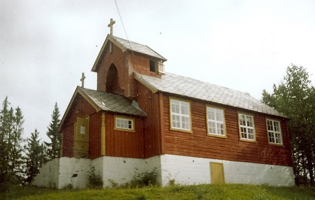 Aunegrenda kapell